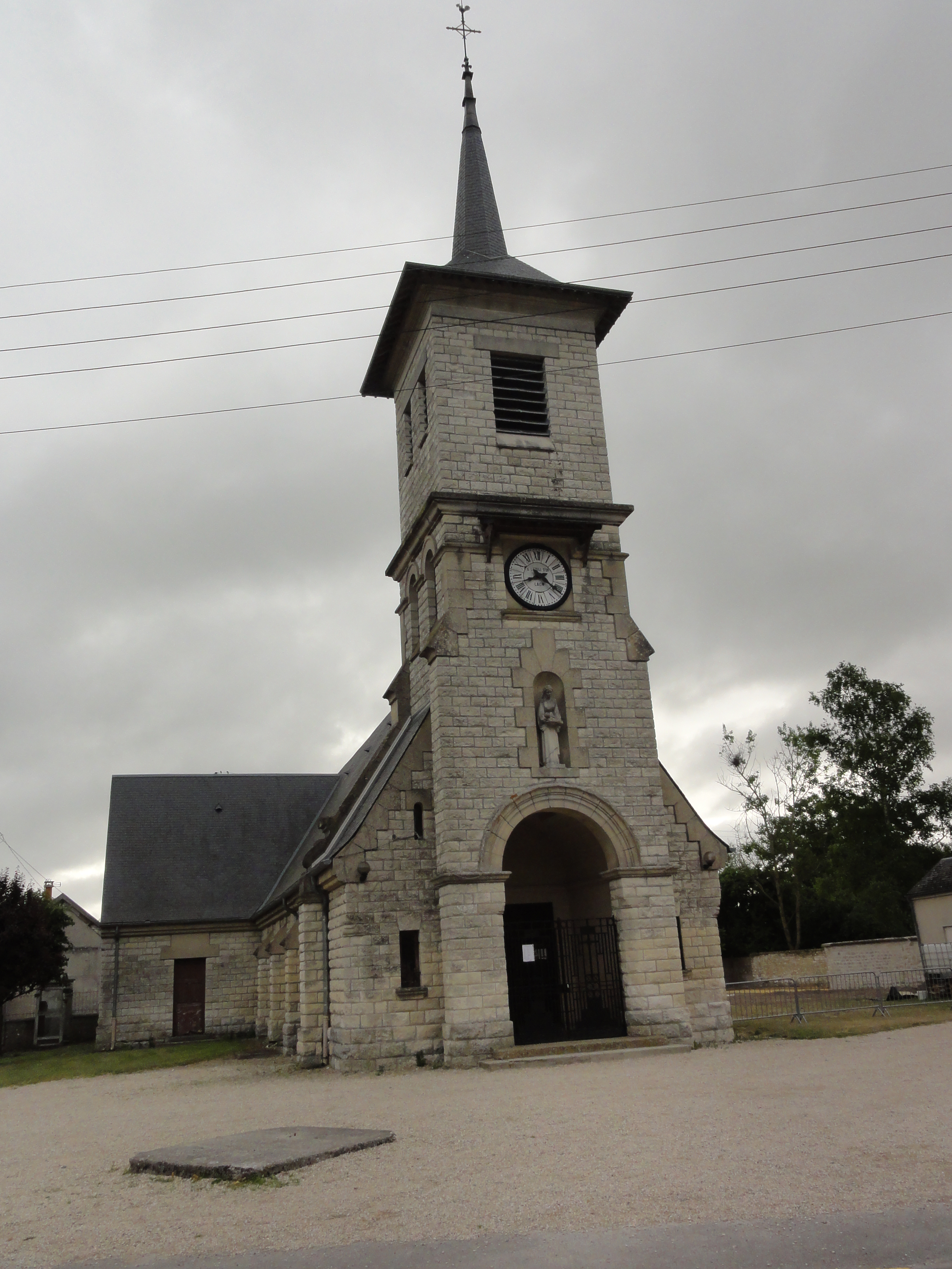 La Malmaison (Aisne) église